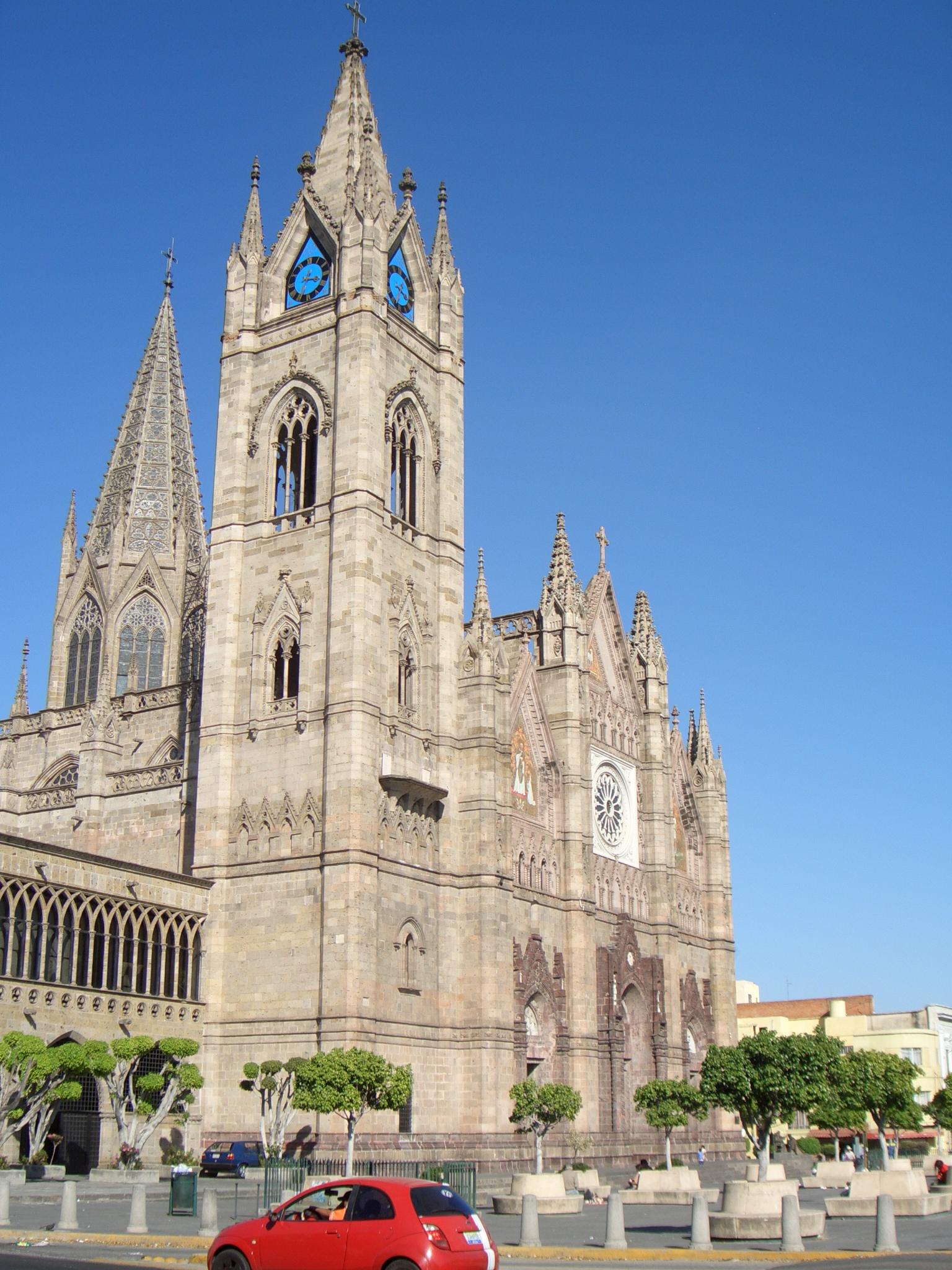 Templo Expiatorio de Guadalajara, Jalisco en México.